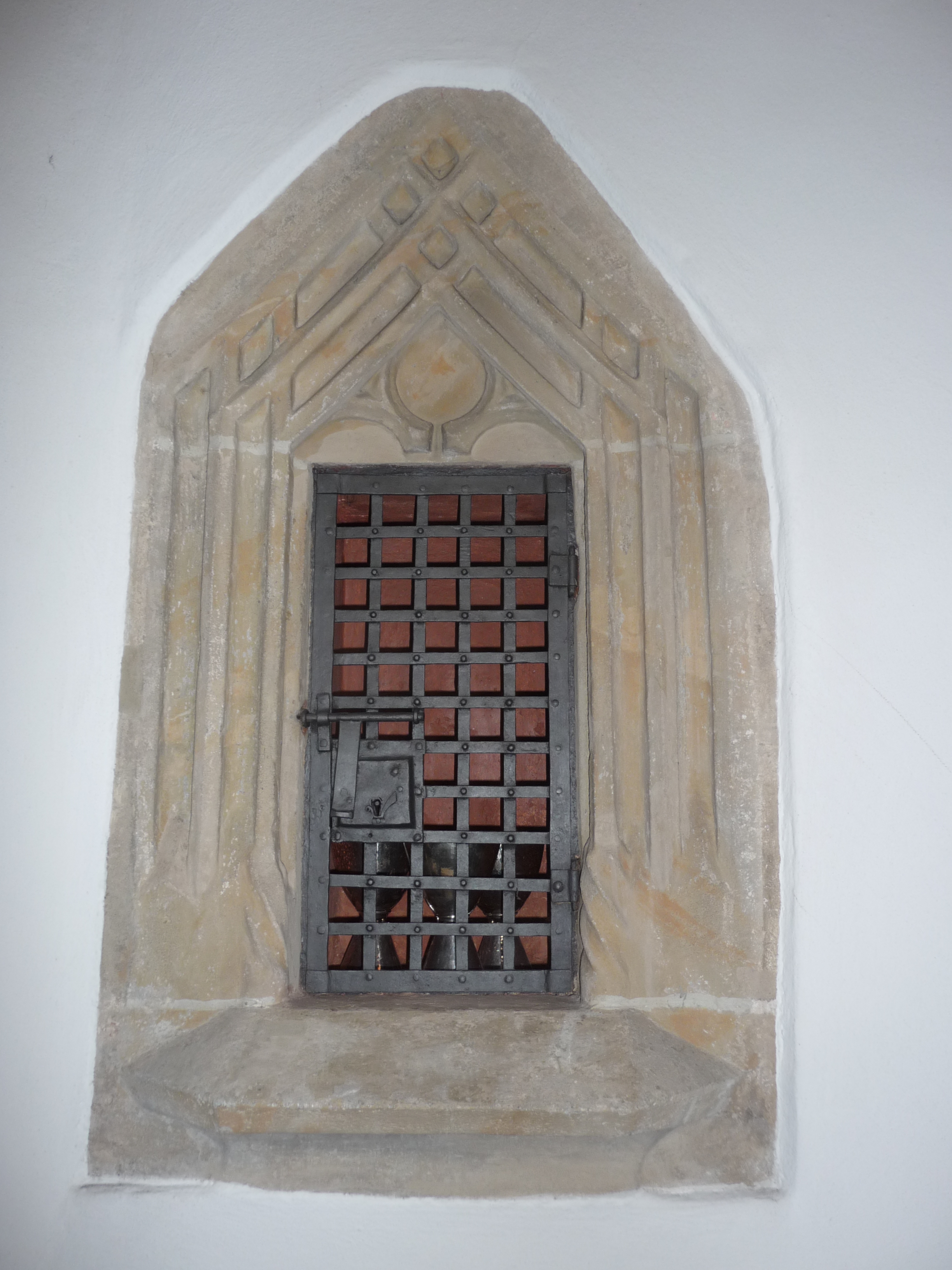 Sakramentsnische im Chorraum in der Sparnecker Kirche St. Vitus